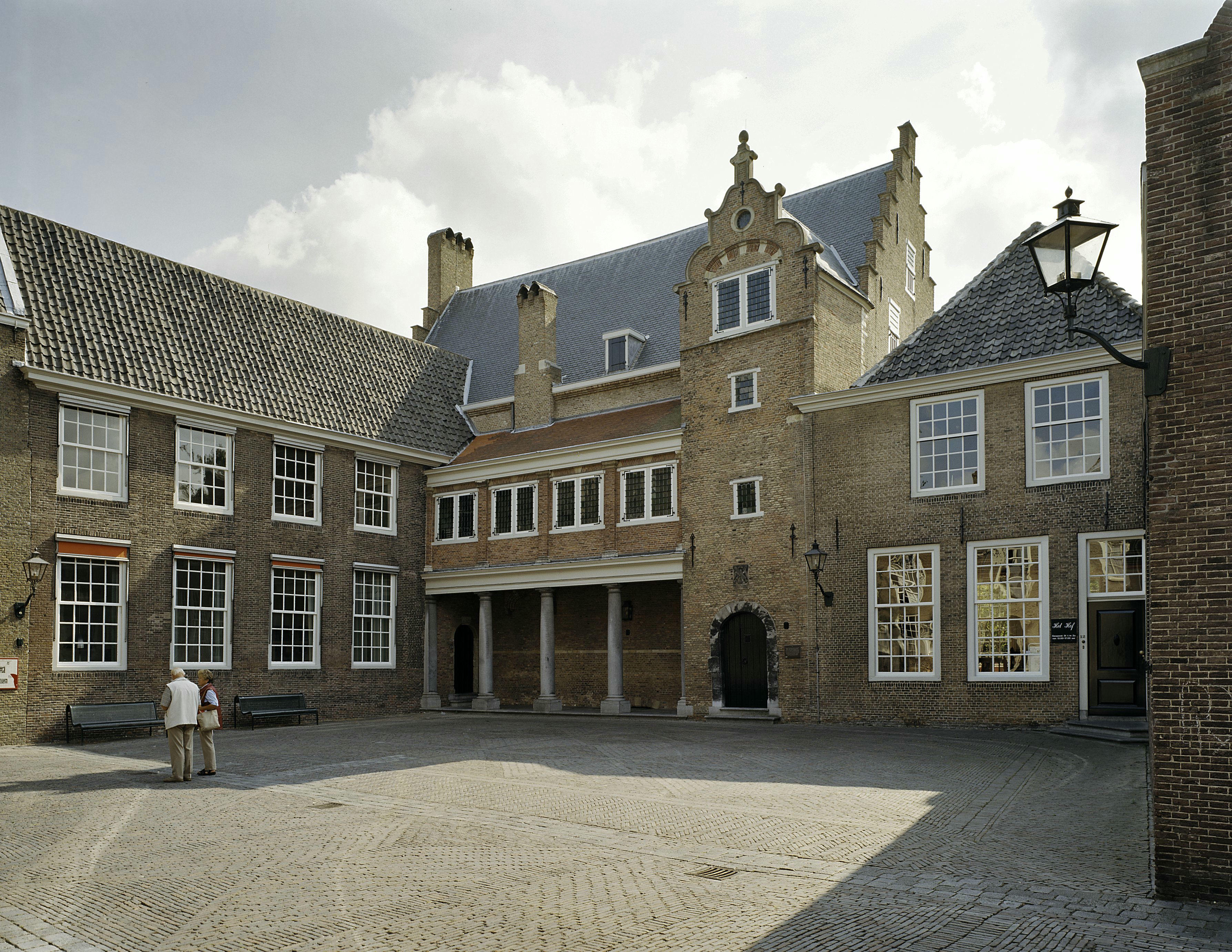 Augustijnenklooster: Overzicht Statenzaal (opmerking: Gefotografeerd voor Monumenten In Nederland Zuid-Holland)